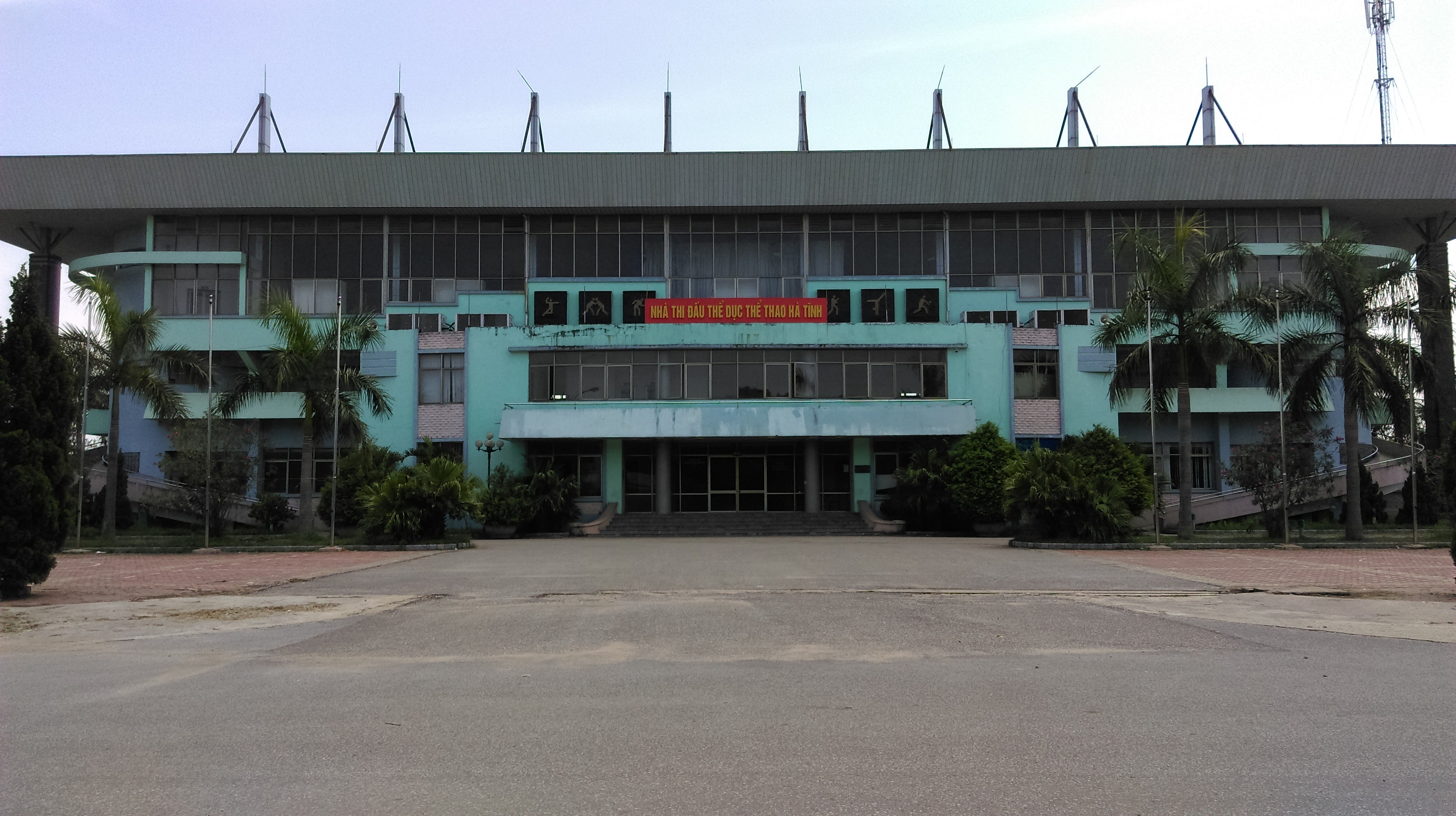 Nhà Thi đấu Thể dục Thể thao Hà Tĩnh